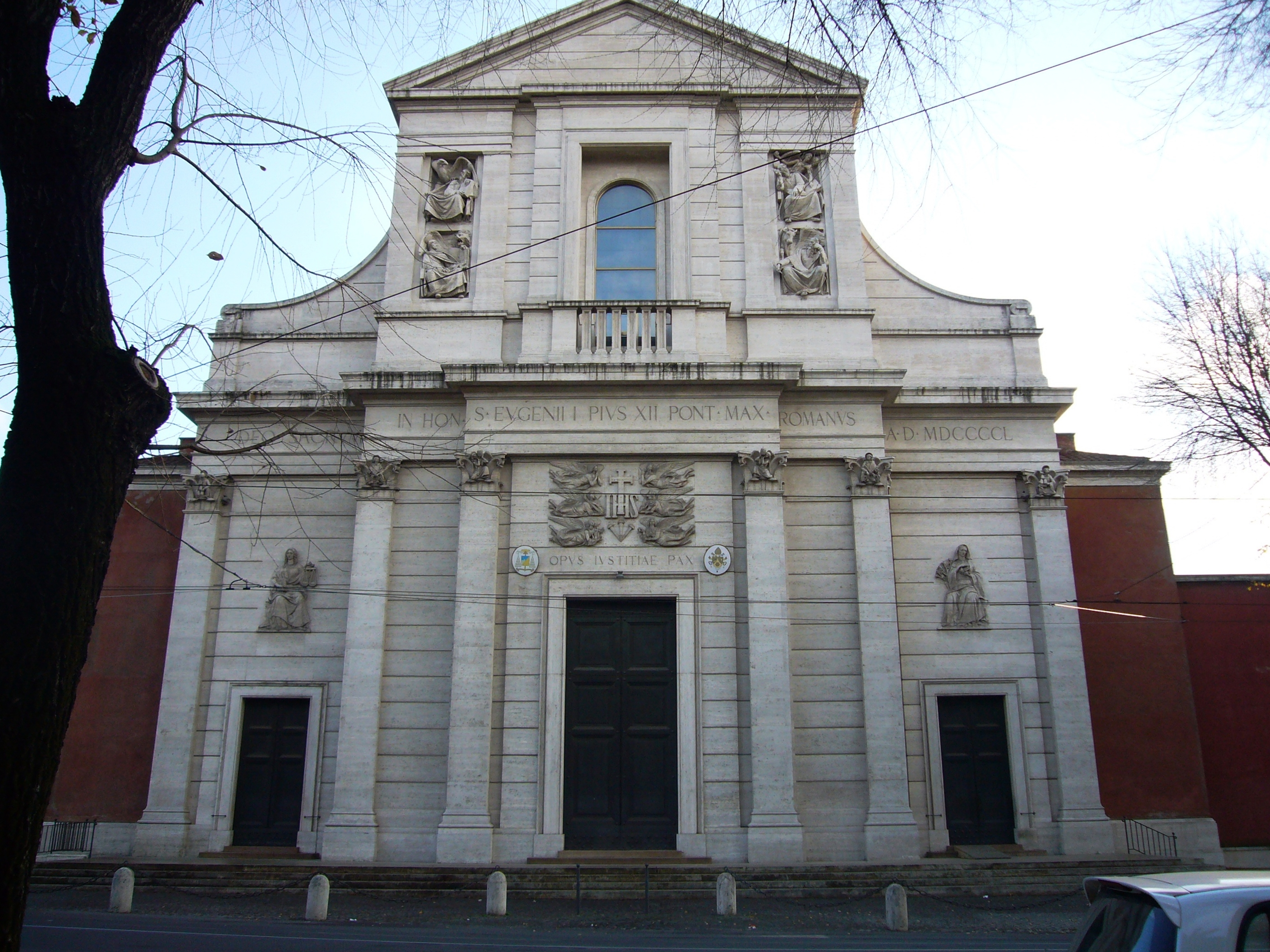 Roma, quartiere Pinciano: Sant'Eugenio